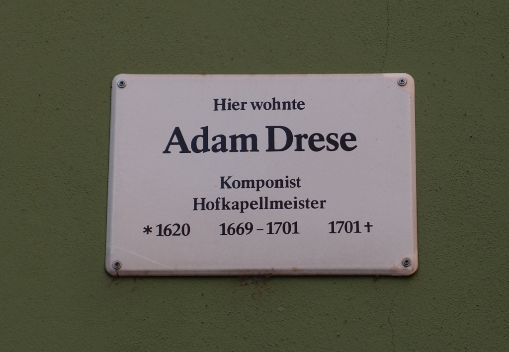 Gedenktafel für den Kapellmeister und Komponisten Adam Drese in Jena, Romantisches Haus